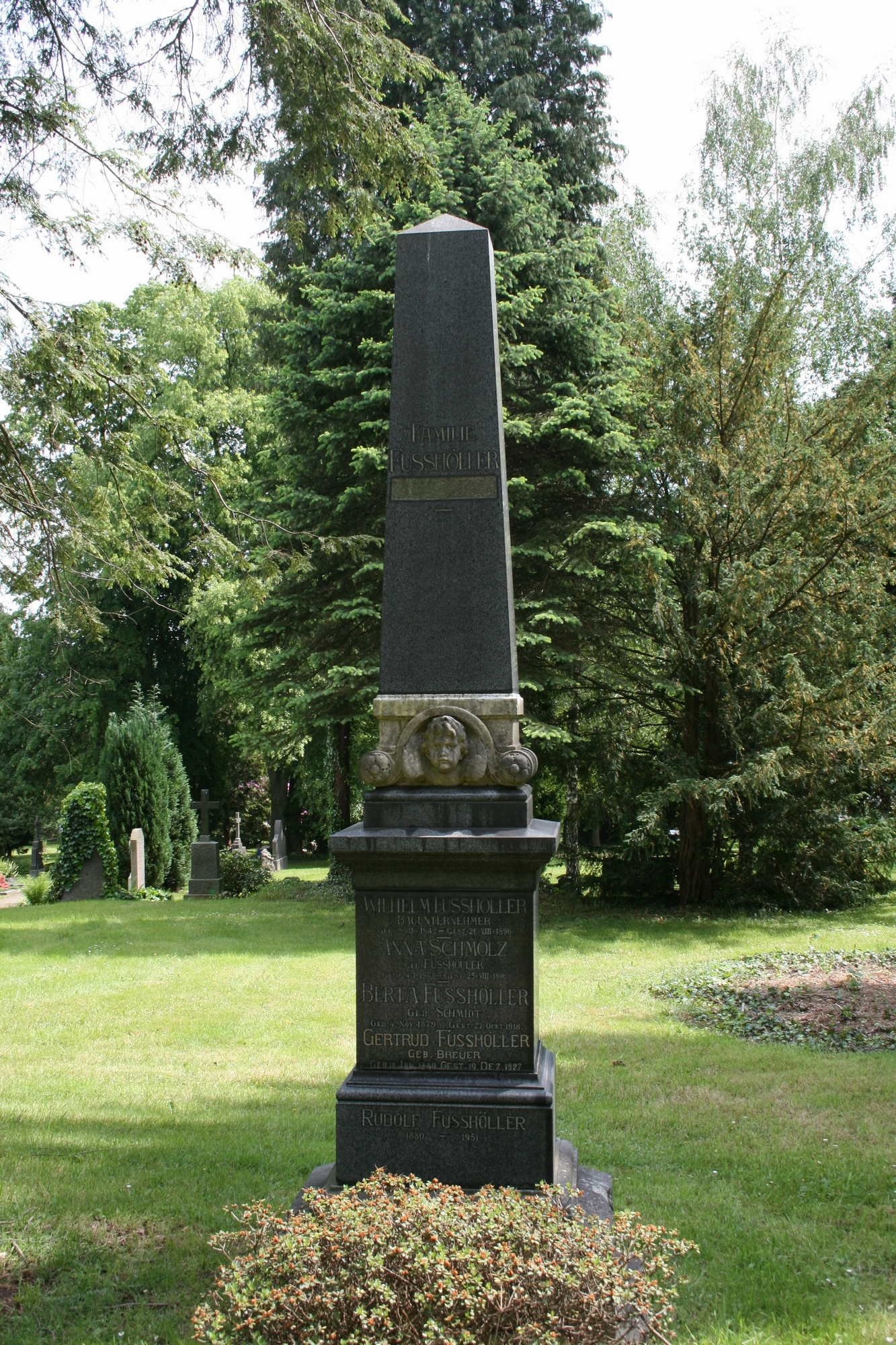 Friedhof Eitorf, Grab Fusshoeller